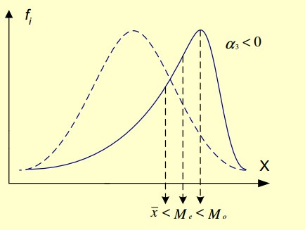 Графички приказ за Негативно асиметричен распоред